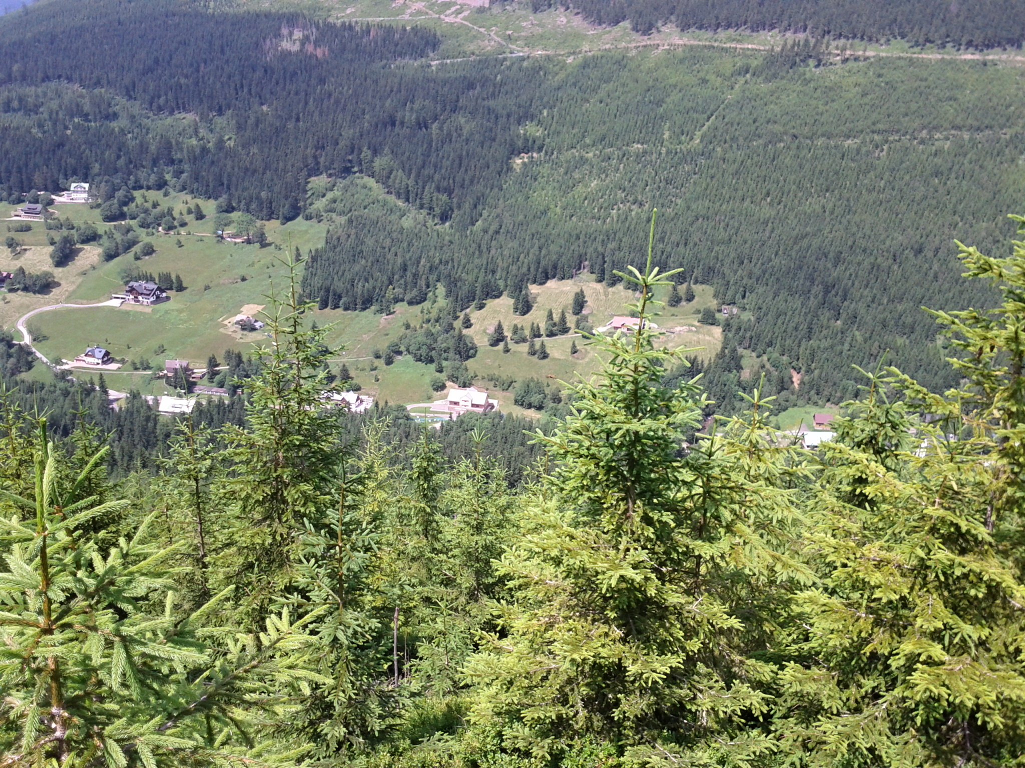 Svatý Petr